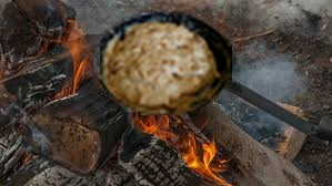 Patranque au seigle et au Cantal